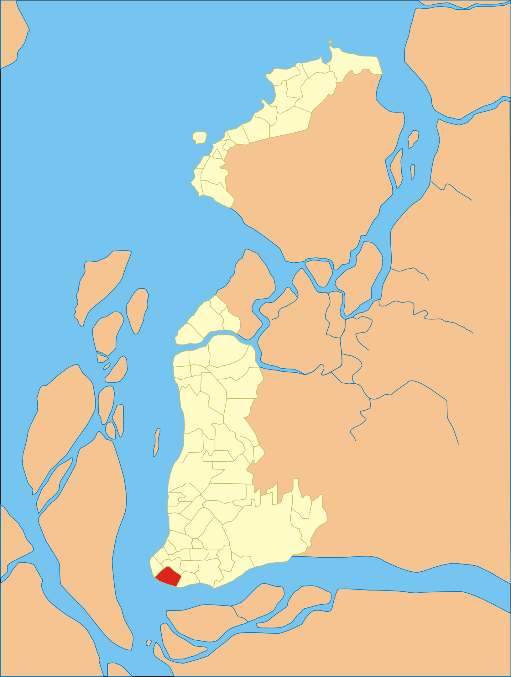 Localização do bairro em Belém do Pará